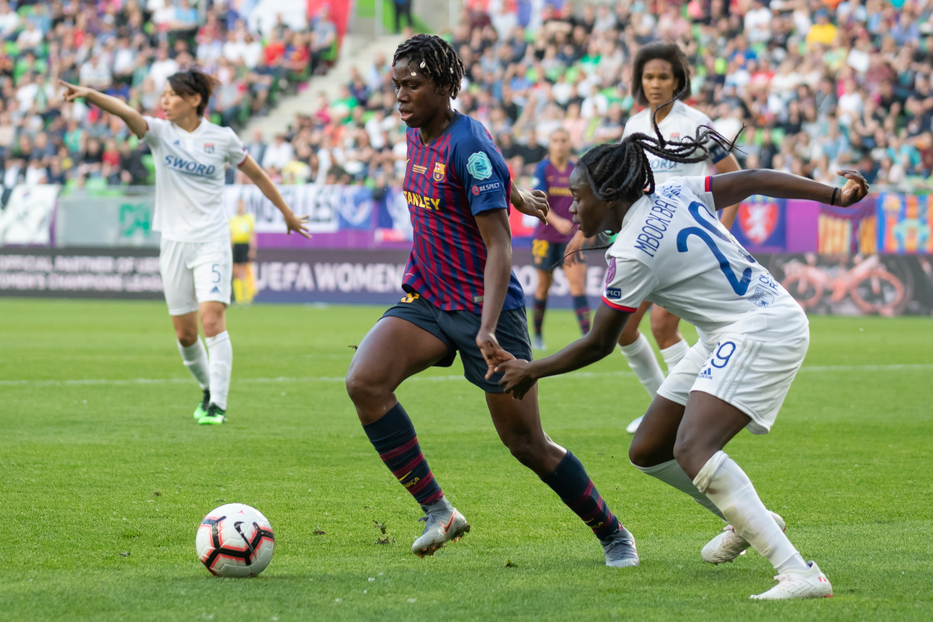 Fußball, Frauen, UEFA Women's Champions League, Olympique Lyonnais - FC Barcelona; v.li.: Asisat Oshoala (FC Barcelona, 20), Griedge M'Bock Bathy (Olympique Lyon, 29); Zweikampf, Duell, Aktion, action